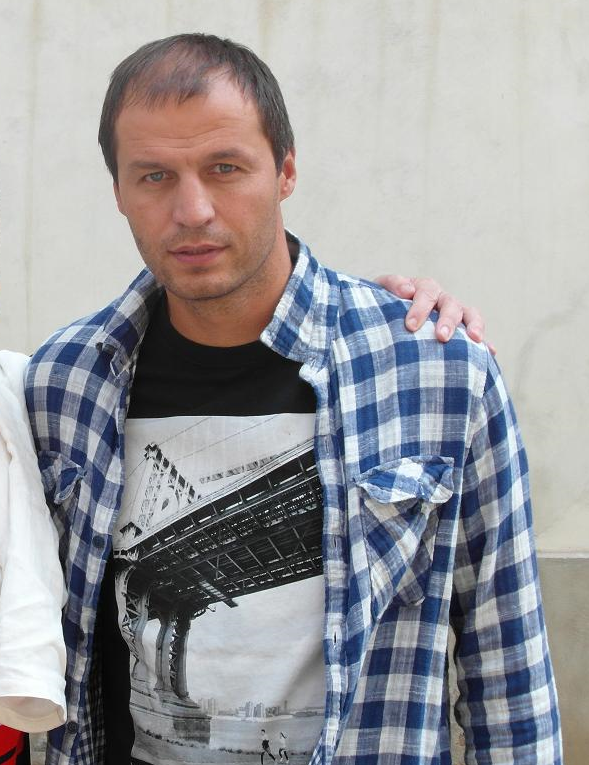 Vratislav Lokvenc, 2013. Former football player from Czech Republic.